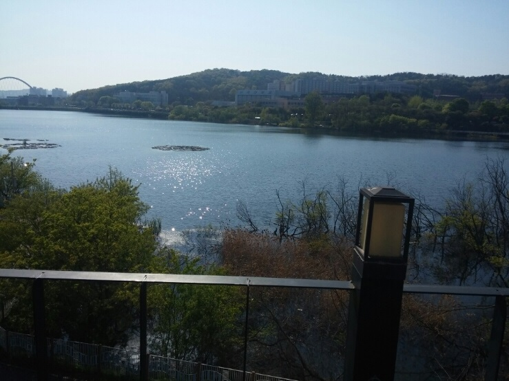 단대호수 전경(천안,면적:318,964㎡,만수위 기준 33ha)